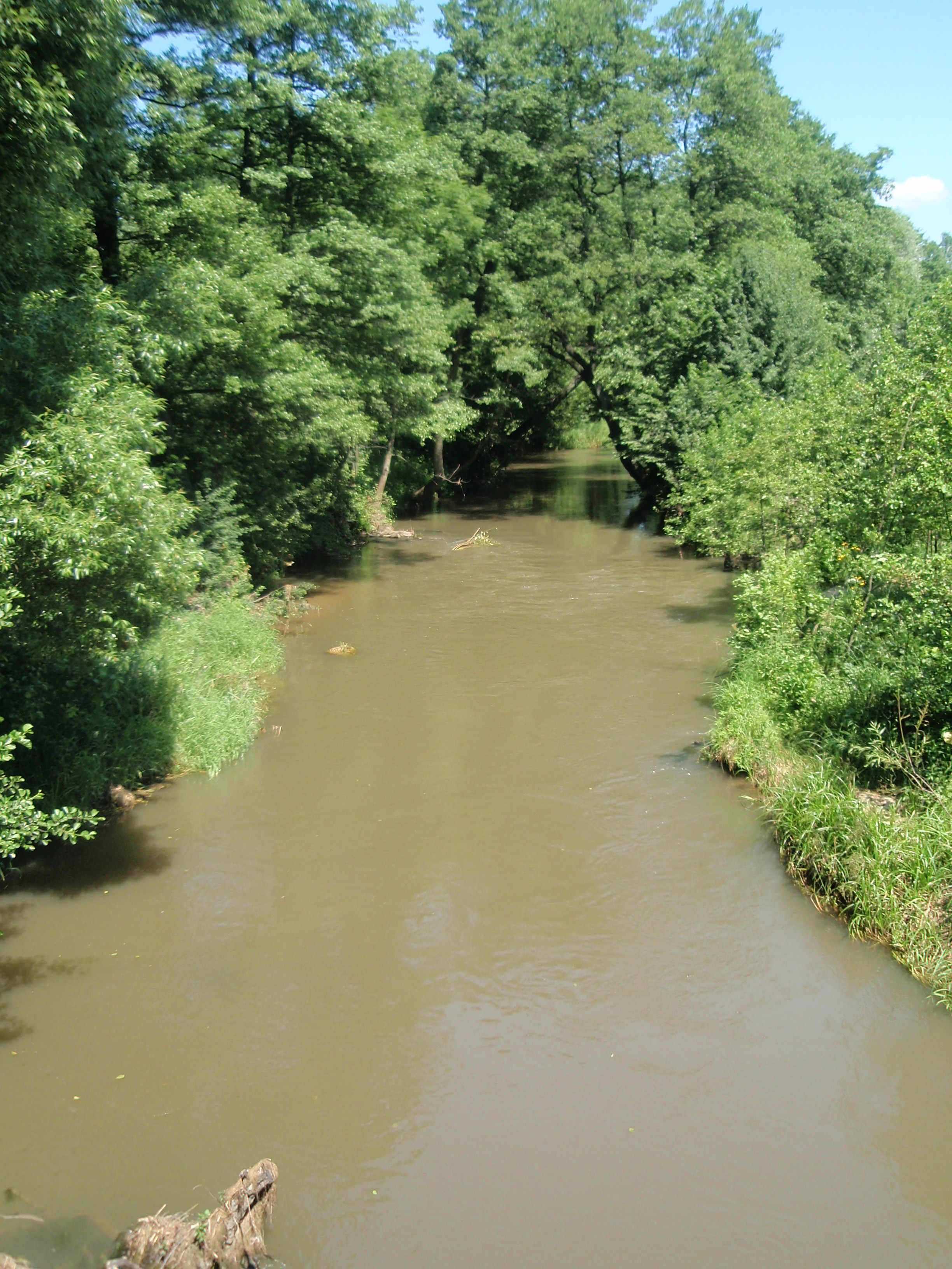 Biała Przemsza w Sławkowie (woj. śląskie)